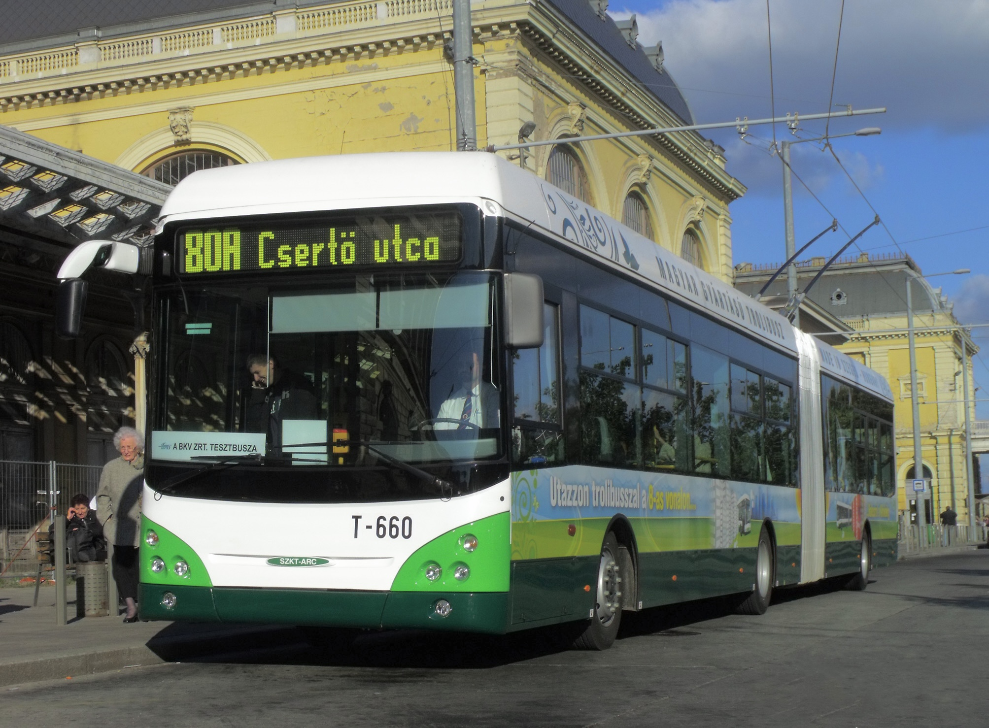 Szegedi ARC V187Tr trolibusz próbajáraton Budapesten, a Keleti pályaudvarnál (psz. T-660)